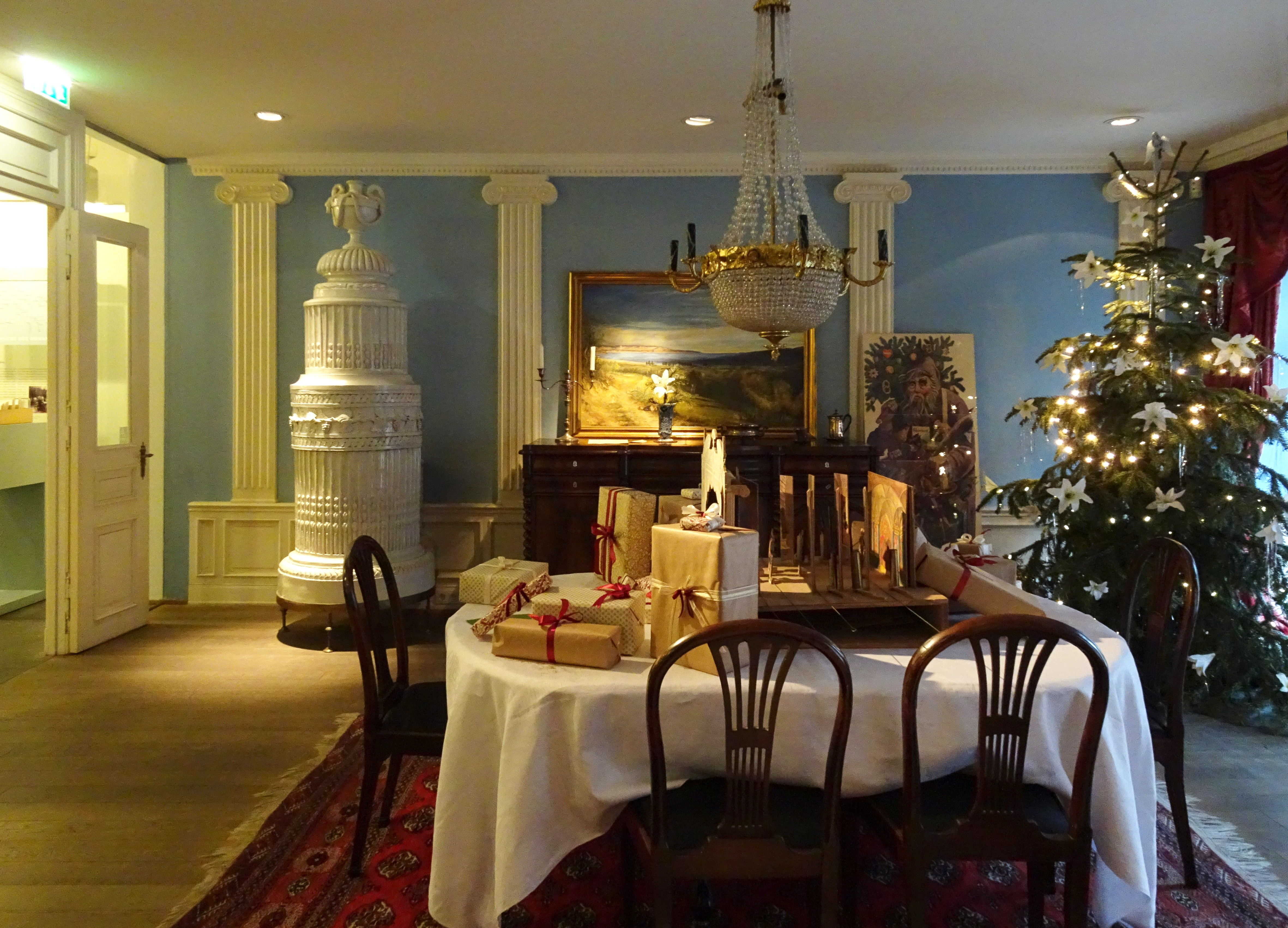 Buddenbrookhaus Saal